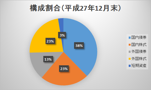 GPIFの資産構成割合（年金積立金全体）